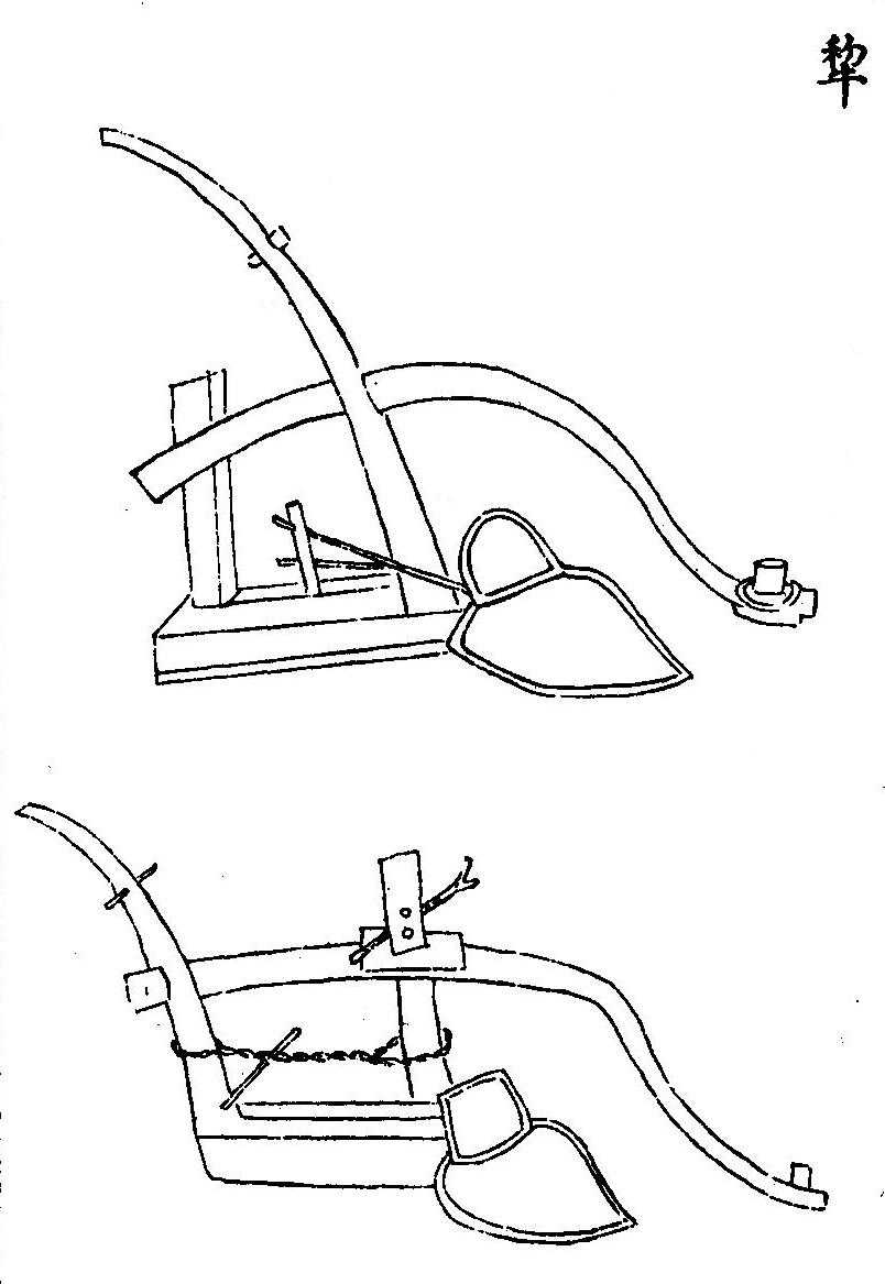 《農器圖譜》：犁